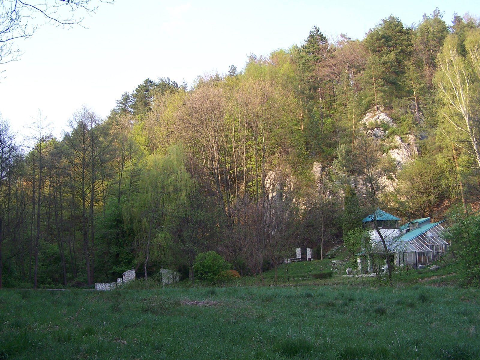 Wąwóz Półrzeczki (Wyżyna Krakowsko-Częstochowska)